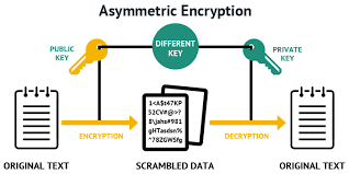 Монгол: Асемметрик түлхүүрийн шифрлэлт